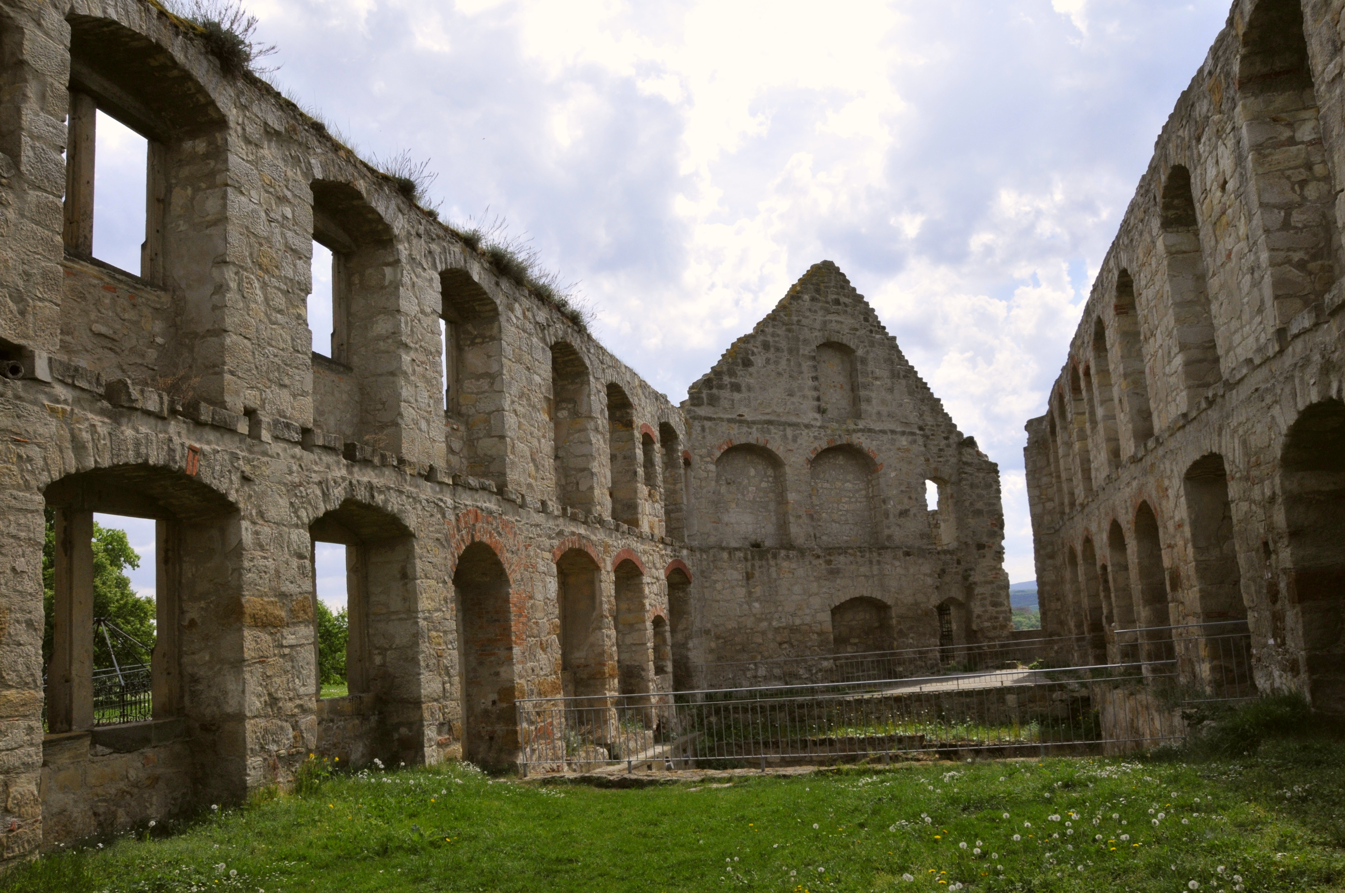 Burg Gleichen, Blick in den ehem. Palas